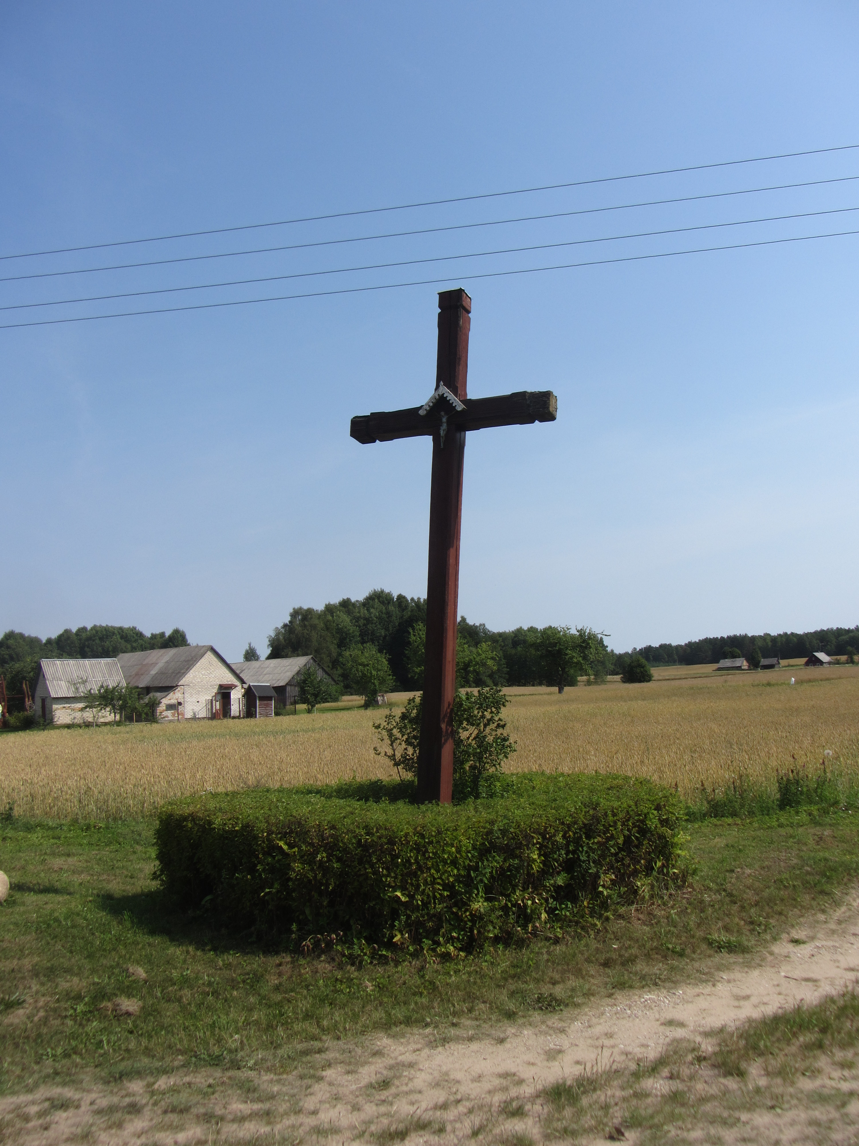 Veisiejų sen., Lithuania